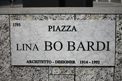 Targa della piazza milanese dedicata